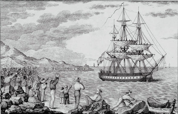 Le navire María Pita, au départ de la Corogne en 1803, gravure de Francisco Pérez.